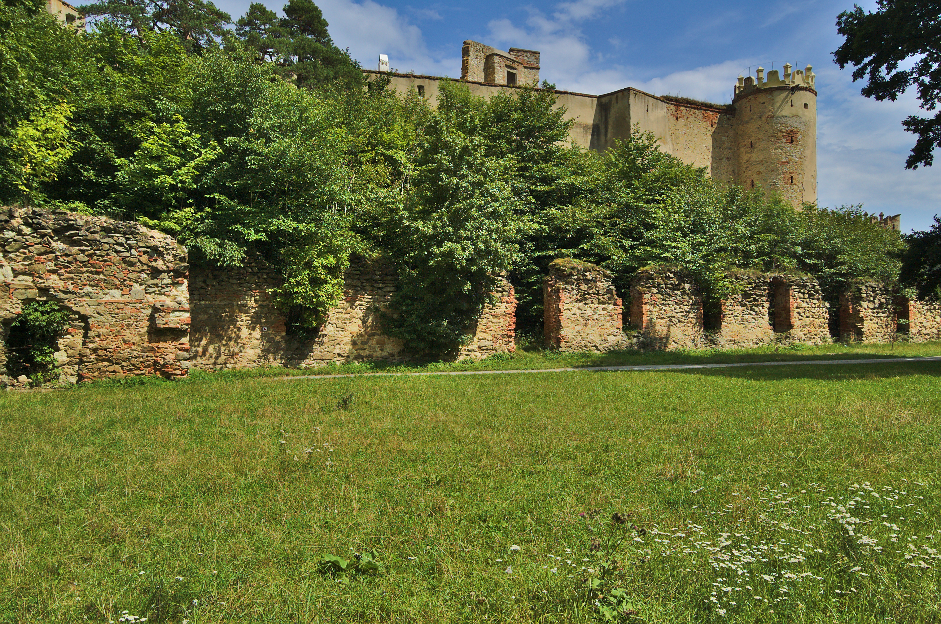 Hrad Boskovice - opevnění, okres Blansko